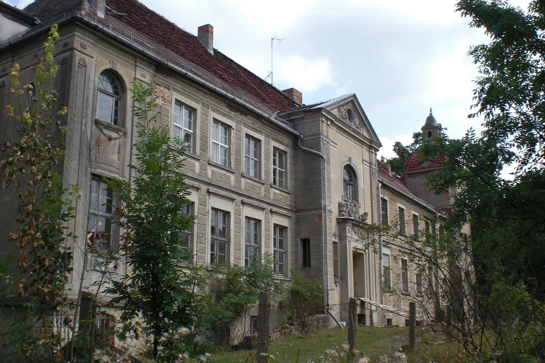 Krampfer war von ca. 1400 bis 1945 fast durchgängig im Besitz der Familie von Moellendorff, die ursprünglich aus der Altmark stammt. 1608 sind das Dorf und das Gut abgebrannt. Im Kern aus der Mitte des 18. Jh. wurde das Schloss 1809 in frühklassizistischer Manier und 1909 im neobarocken Stil umgebaut. Es wurde von 1946 bis 1990 von verschiedenen staatlichen Einrichtungen genutzt und steht seit der Wende weitestgehend leer. Es befindet sich in Privatbesitz.